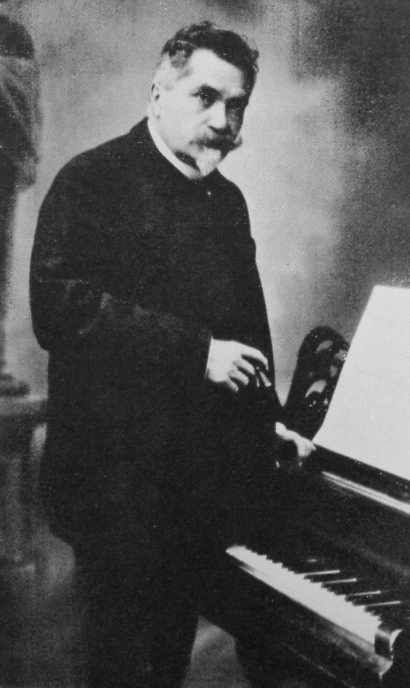 Василий Ильич Сафонов 1902 (пианист, профессор, директор московской консерватории)